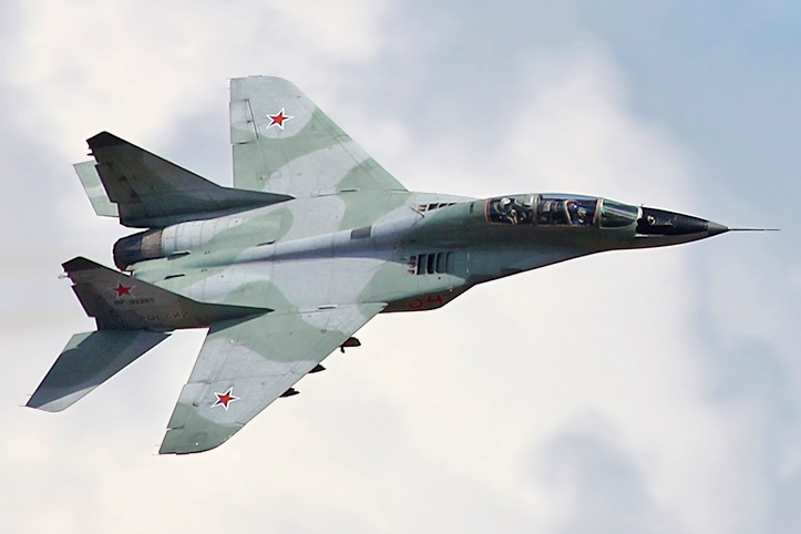 Aviamix 2015